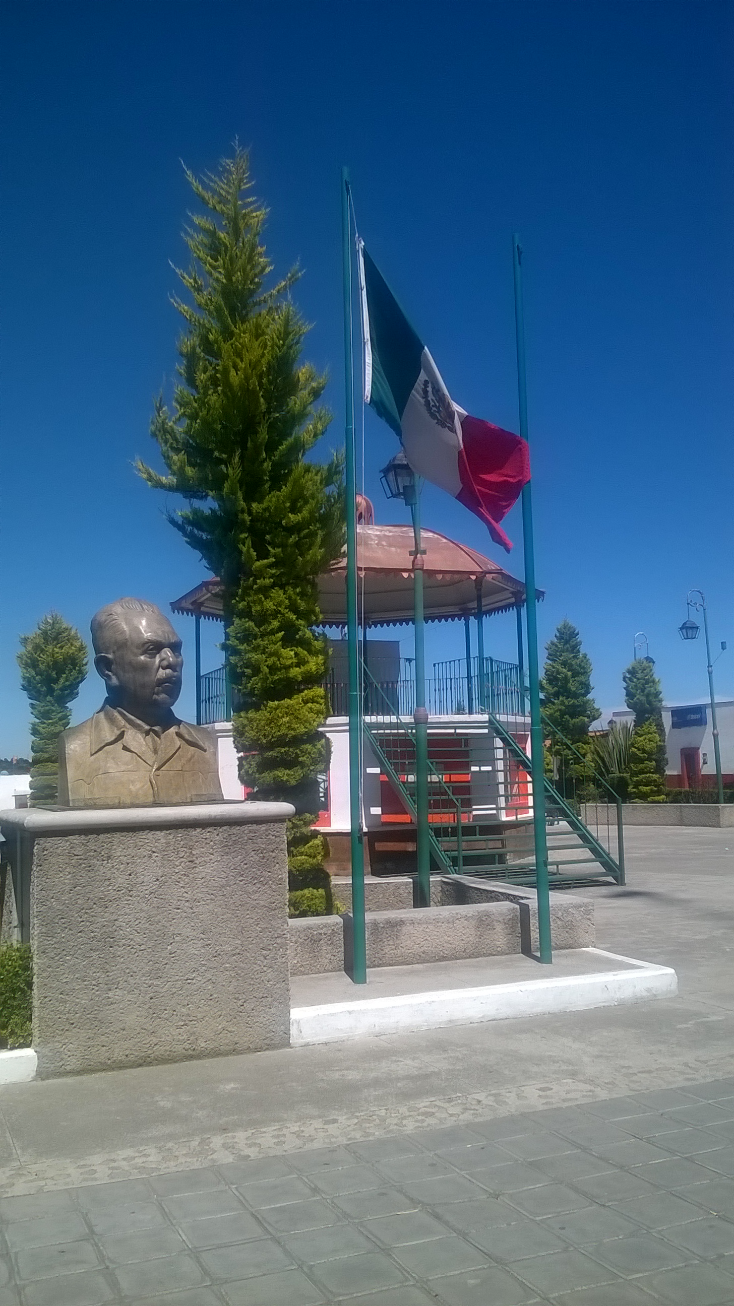 Plaza, Sanctorum, Tlaxcala